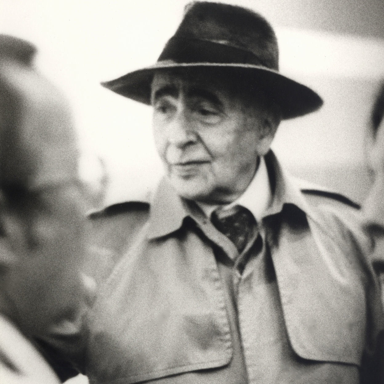 Pour la présentation de "La messe d'Elsa" à Lyon, le 19 juin 1981, Louis ARAGON honore l'auditorium Maurice Ravel de sa présence. Il a alors 84 ans, et disparaitra deux ans plus tard. Photo Bernardo LE CHALLOUX.